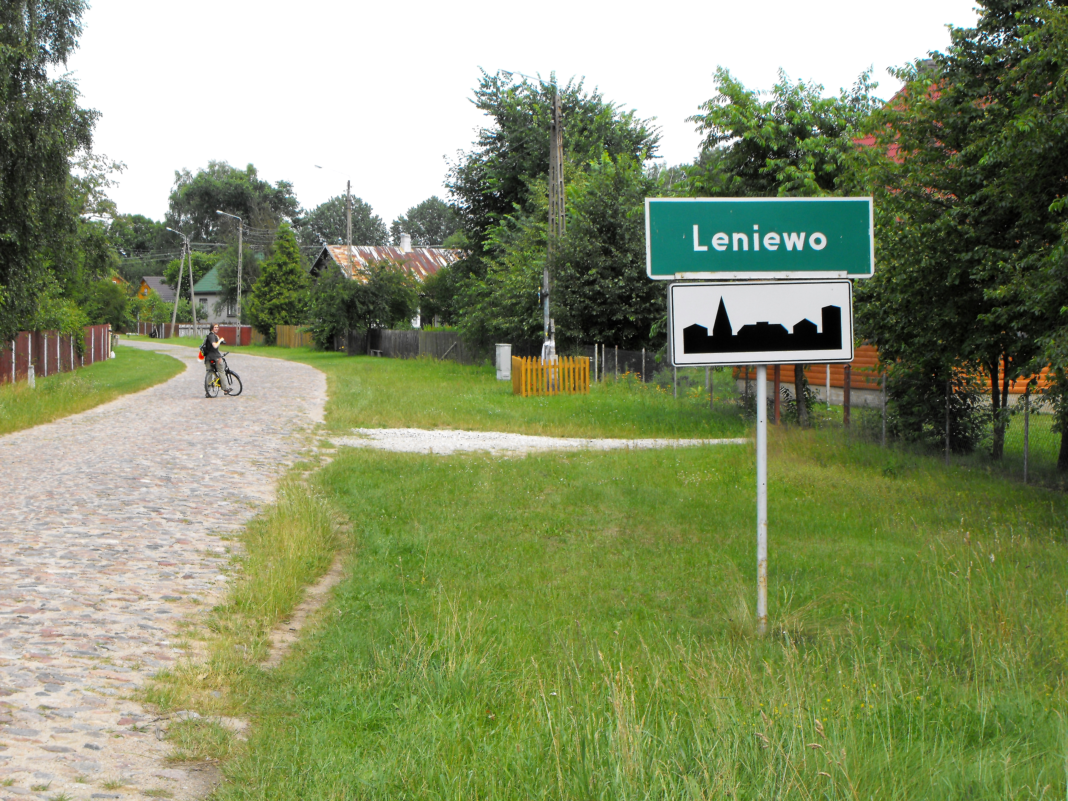 Droga wjazdowa do Leniewa.